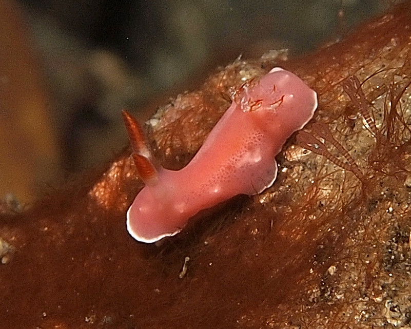 Noumea romeri